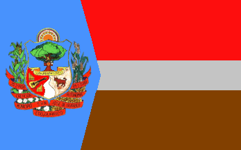 Bandera del municipio San José de Guaribe, estado Guárico, Venezuela